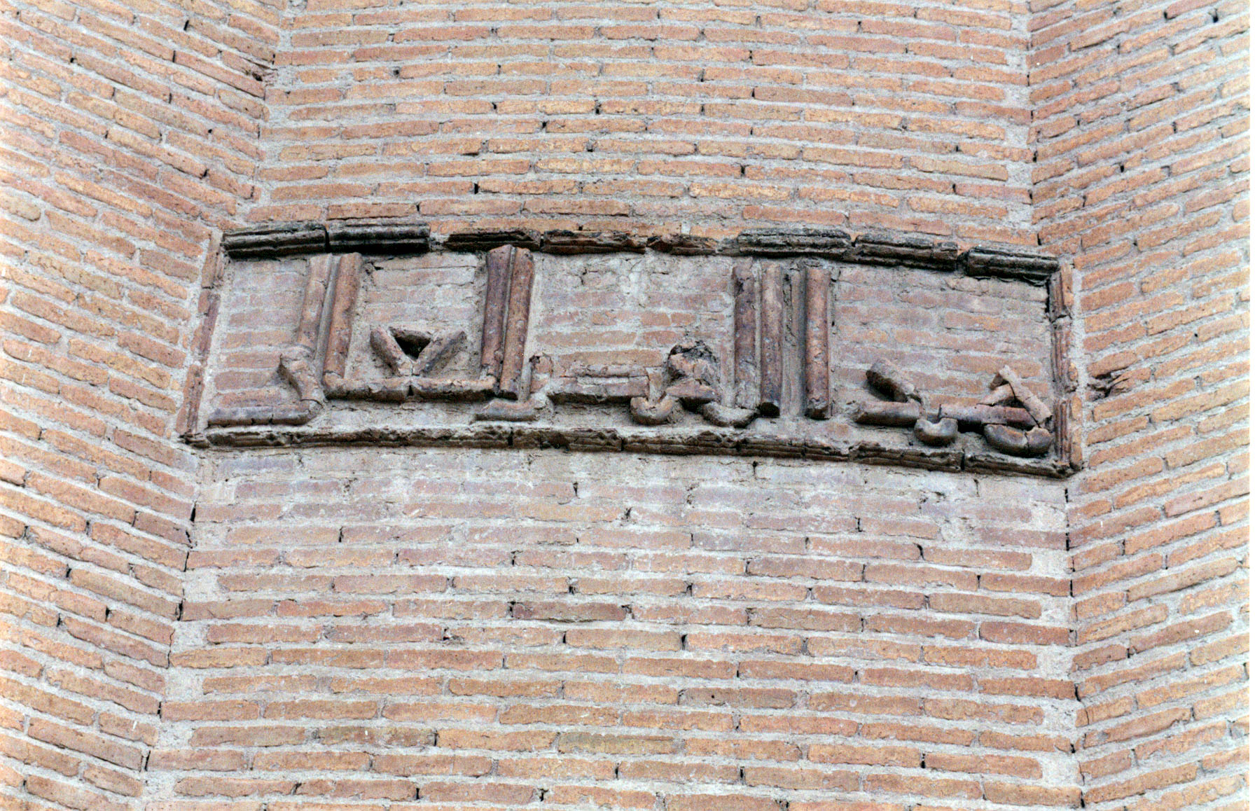 کتیبه